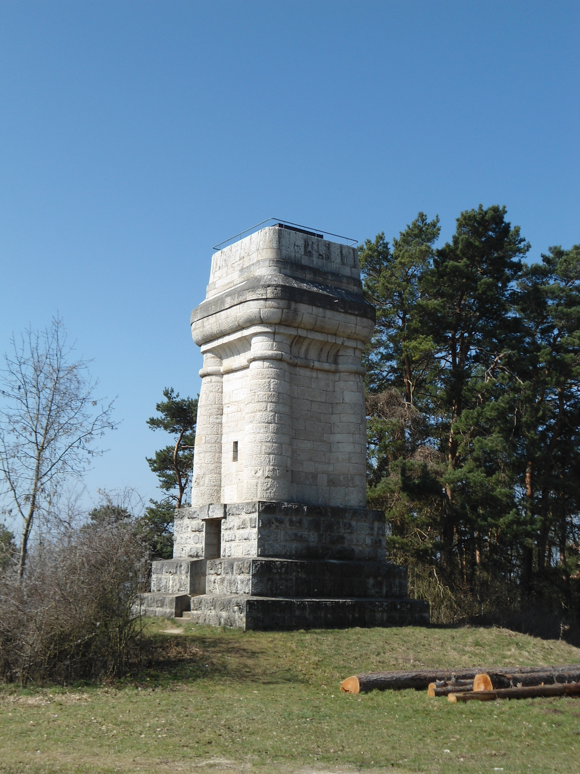 Bismarckturm